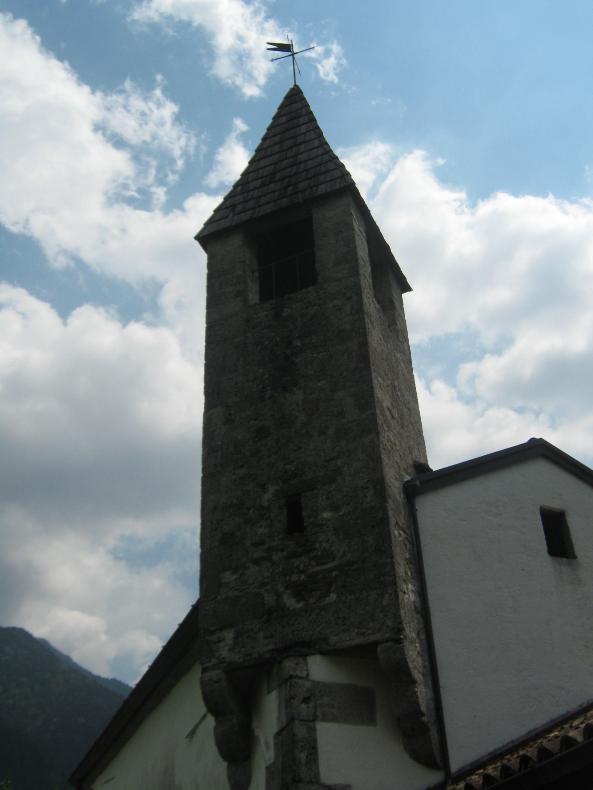 CHIESA DI SANTO SPIRITO PARTICOLARE DEL CAMPANILE